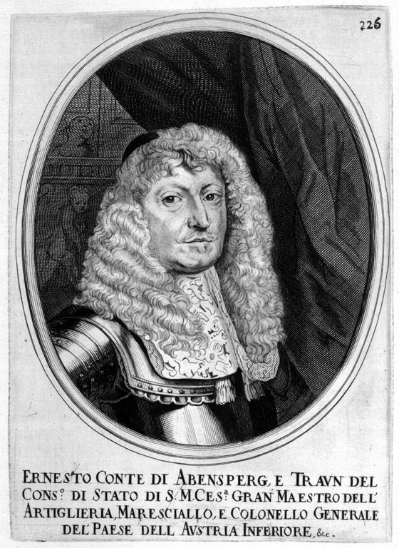 Der niederösterreichische Kammerpräsident und Landmarschall Ernst Abensperg und Traun (1608-1668)